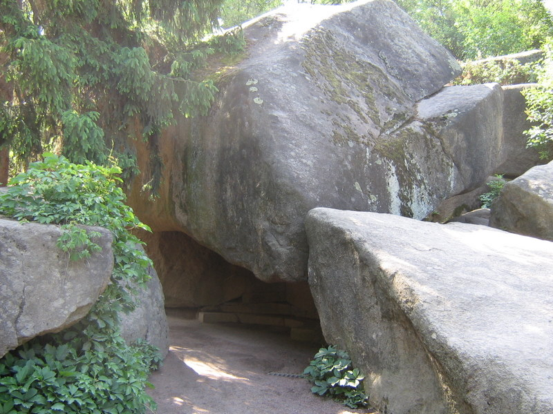 Грот страха и сомнений.